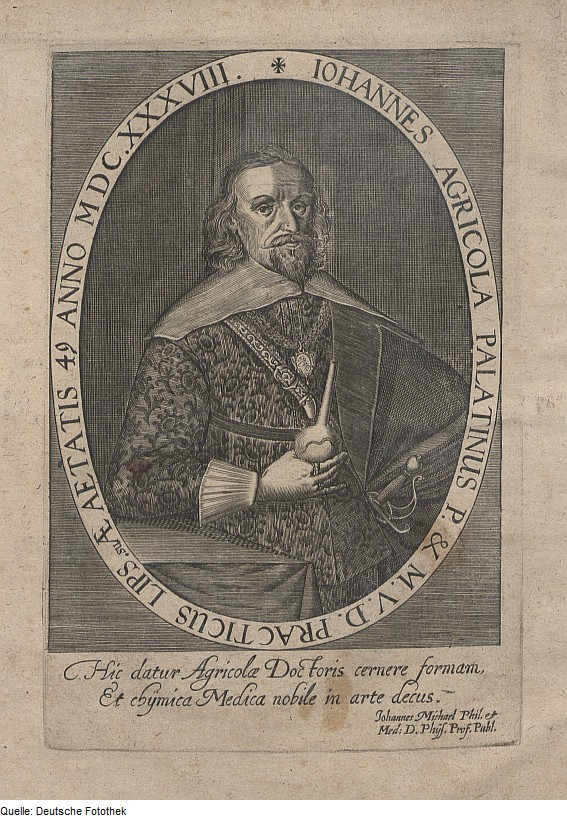 Original image description from the Deutsche Fotothek Medizin & Chemie & Alchemie